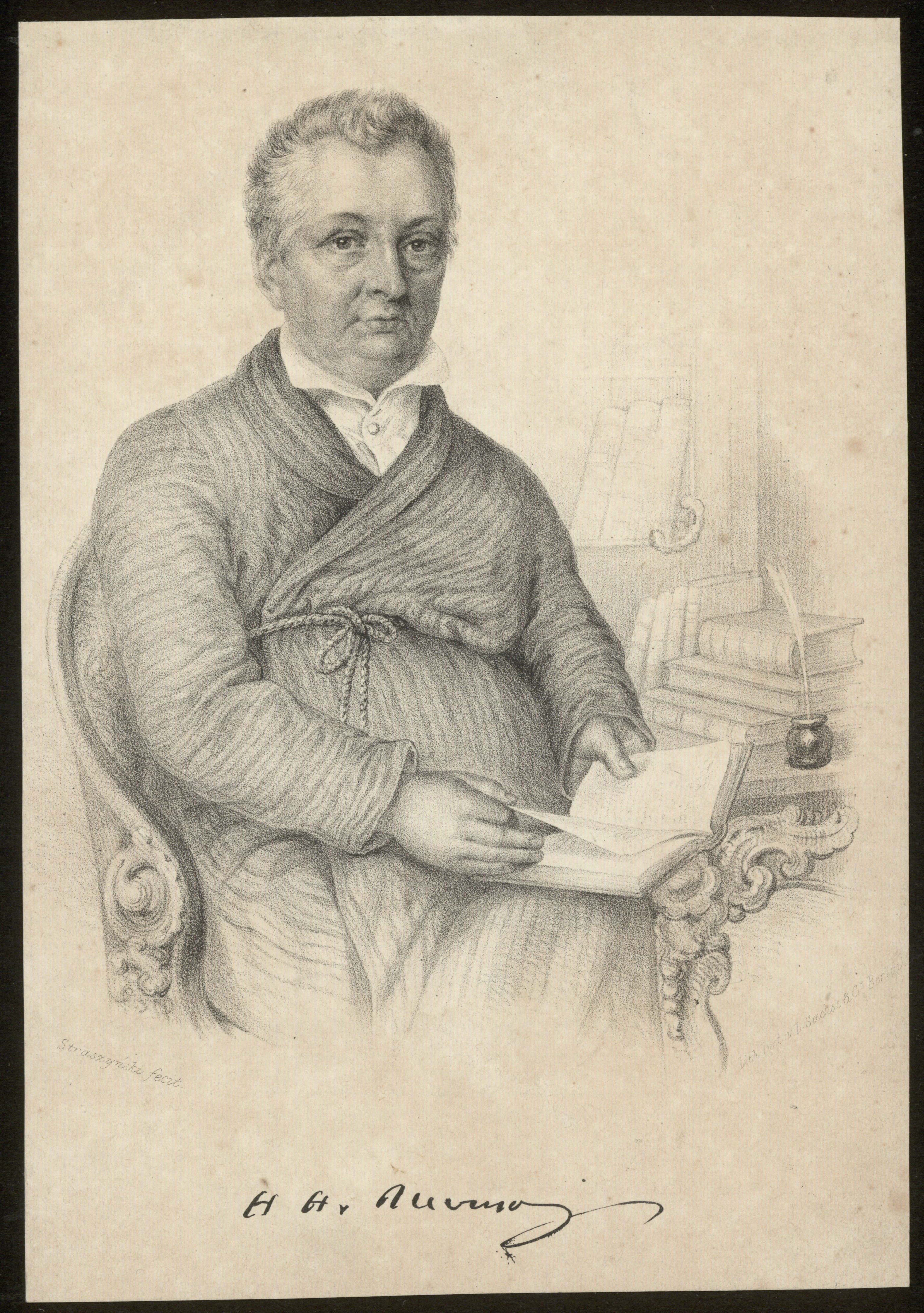 Henryk Rzewuski, 1850 r.